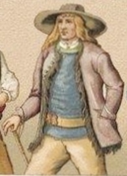 Montagnard de La Feuillée, portant la veste doublée de fourrure à longs poils, le gilet de drap croisé sur lui-même et entièrement clos, serré à la taille par un ceinturon à plaque ; large chapeau de feutre.